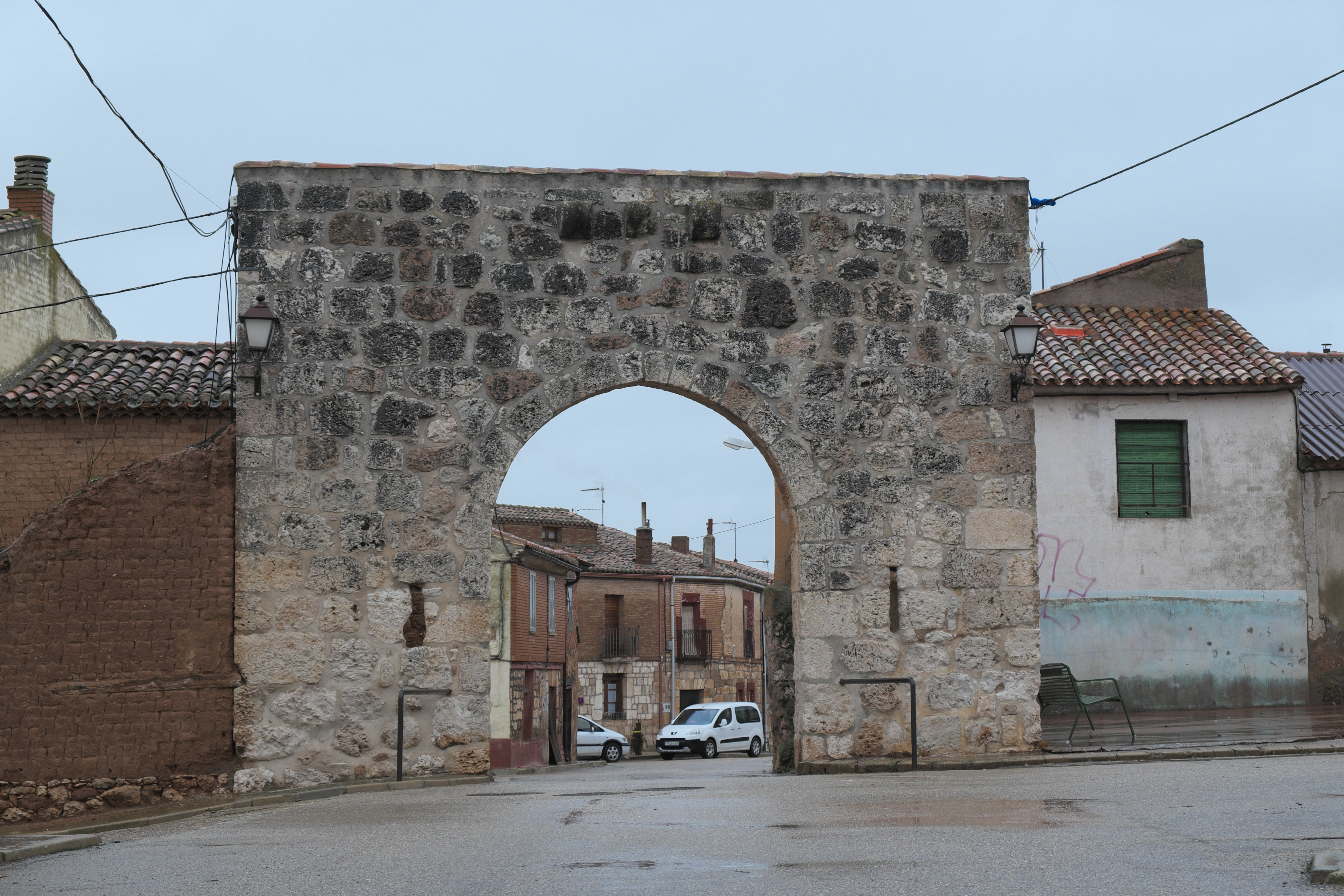 Stadttor in Villahoz in der Provinz Burgos (Kastilien-León/Spanien)